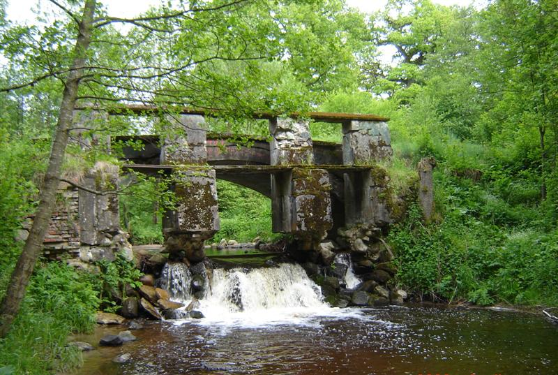 Tychówko - stary Młyn w czerwcu 2006.